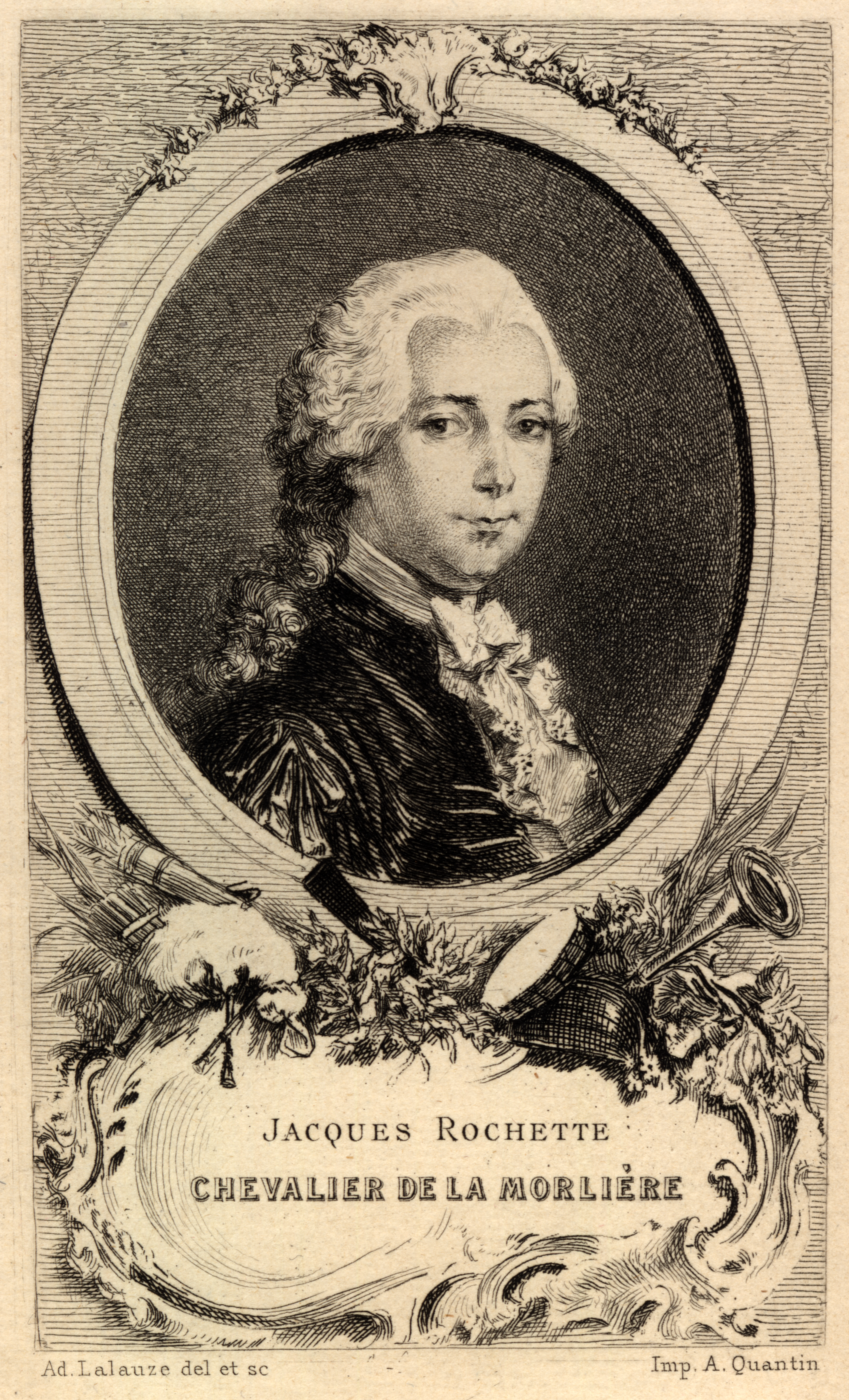 Portrait von Jacques Rochette de La Morlière